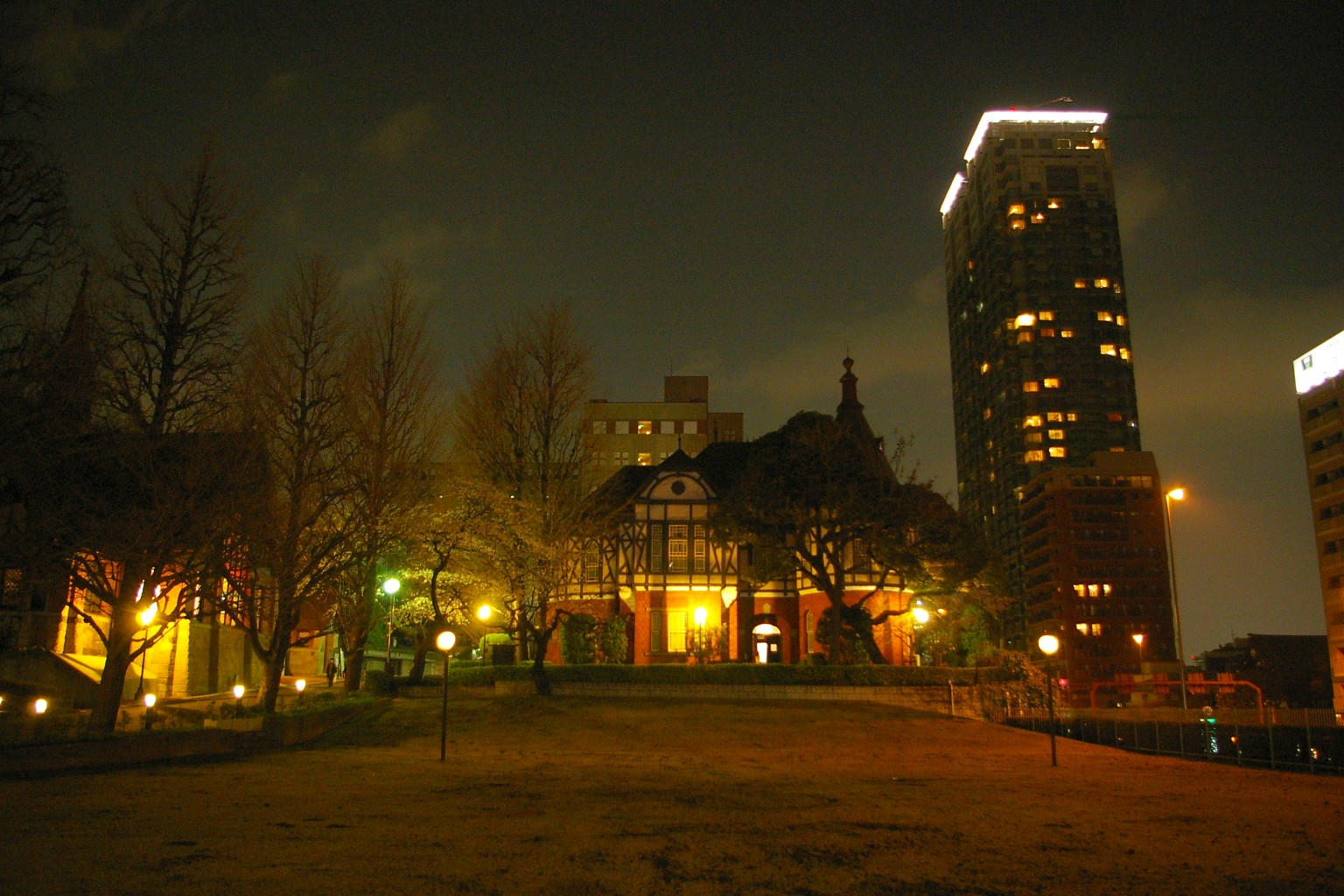 took myself